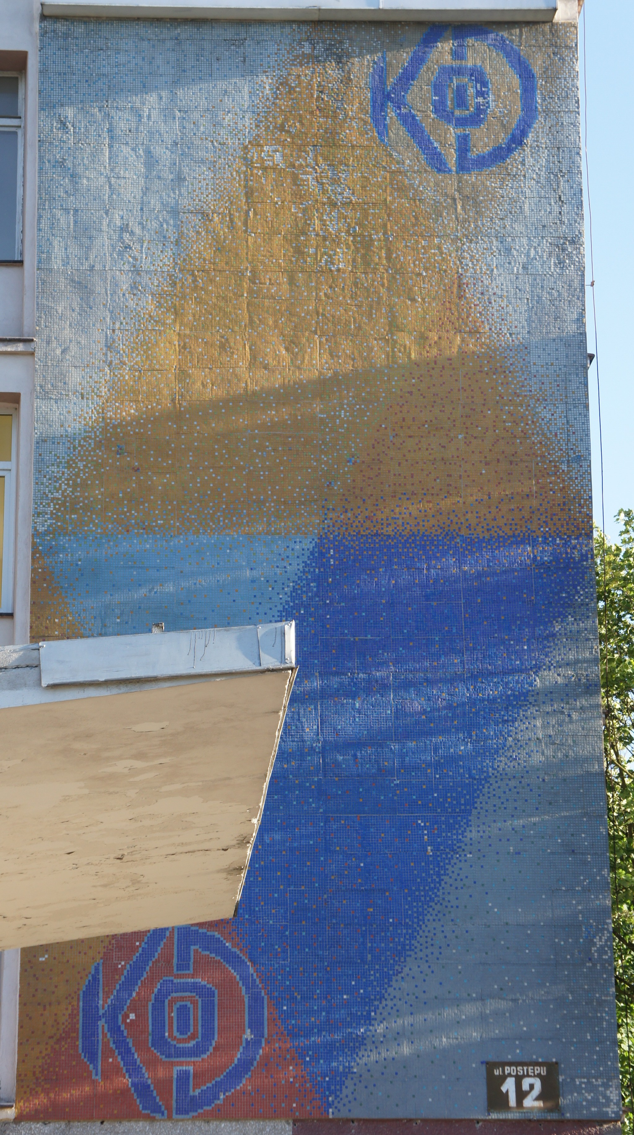 Witromozaika autorstwa Wandy Gosławskiej na północnej ścianie gmachu przy ul. Postępu 12 w Warszawie.